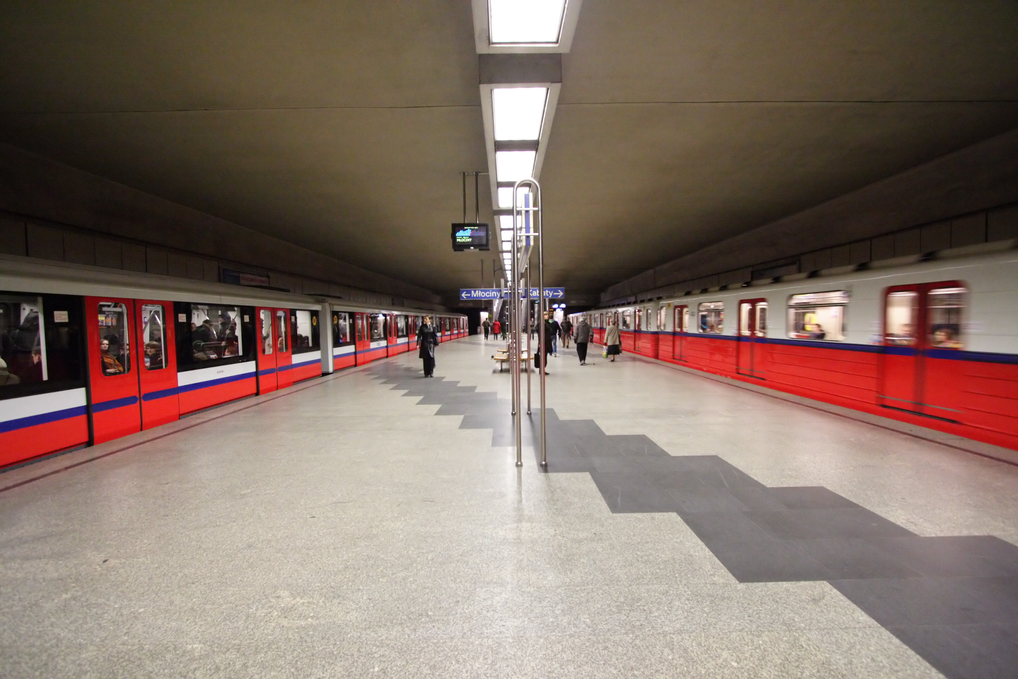 Станция Политехника Варшавского метрополитена; вагоны двух типов